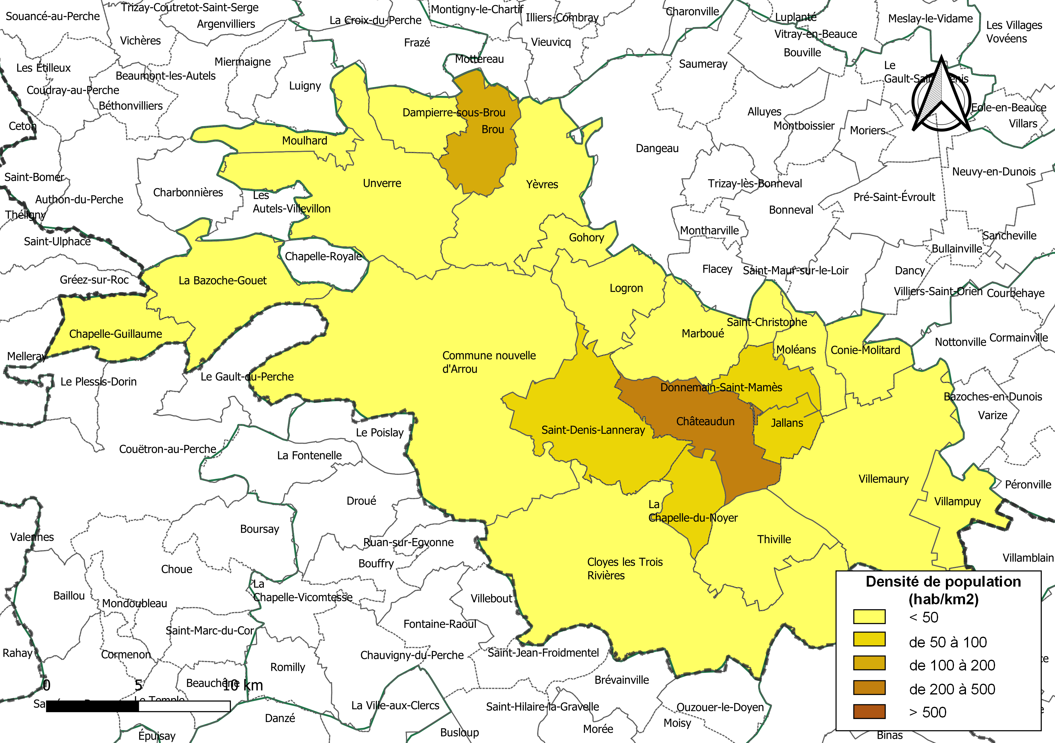 Carte des densités de population (millésimée 2016) des communes de la communauté de communes la Communauté de communes du Grand Châteaudun, département d'Eure-et-Loir, France. Composition au 1er janvier 2019.